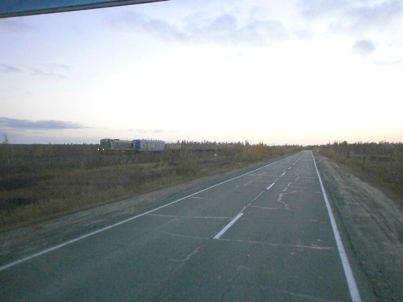 Вид в сторону Надыма. По железной дороге движется грузовой поезд на Новый Уренгой. Следующий поезд будет через двое суток. Время 19:07.